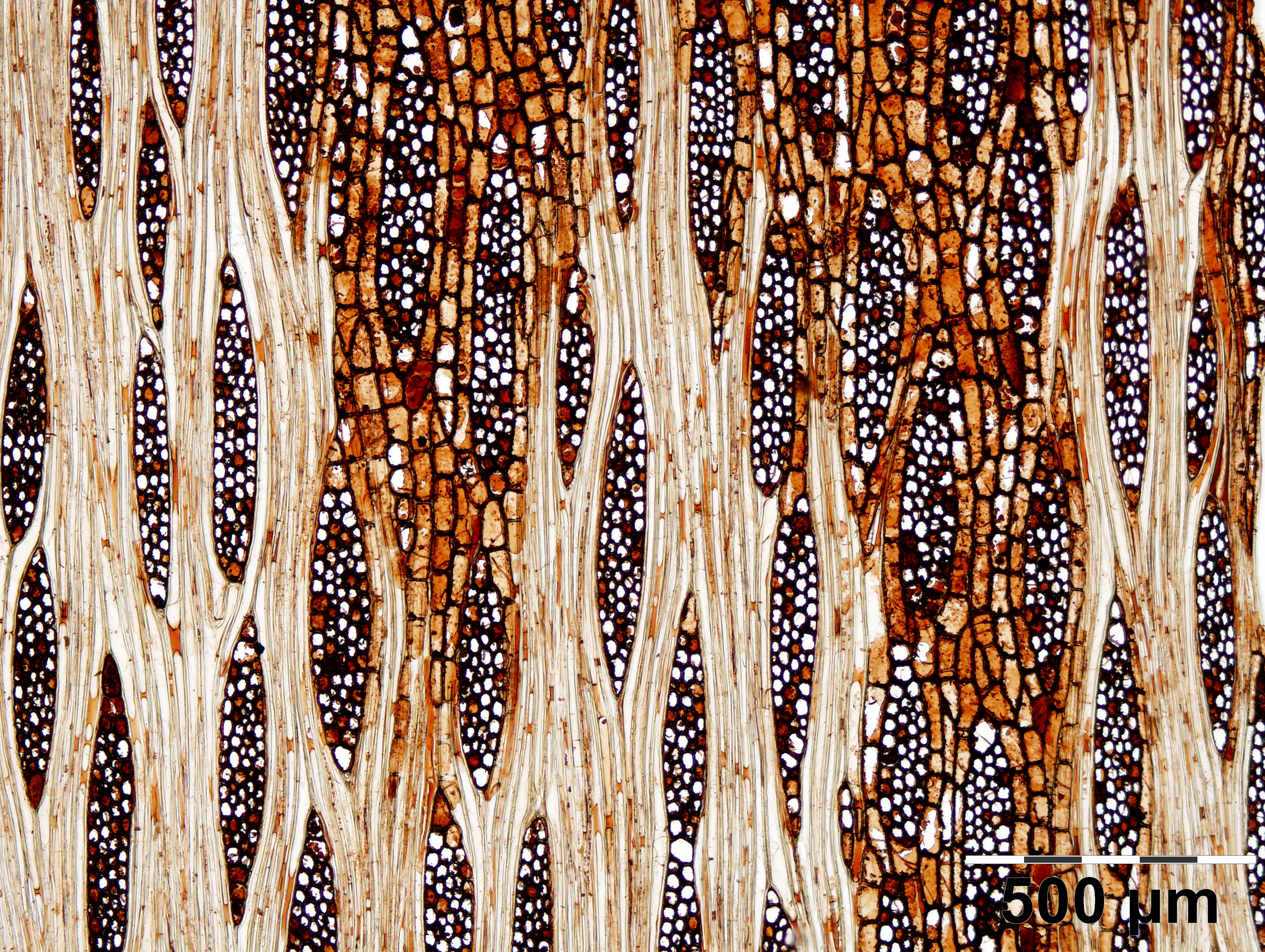 Tangentialschnitt_des_Entadrophragma_candollei